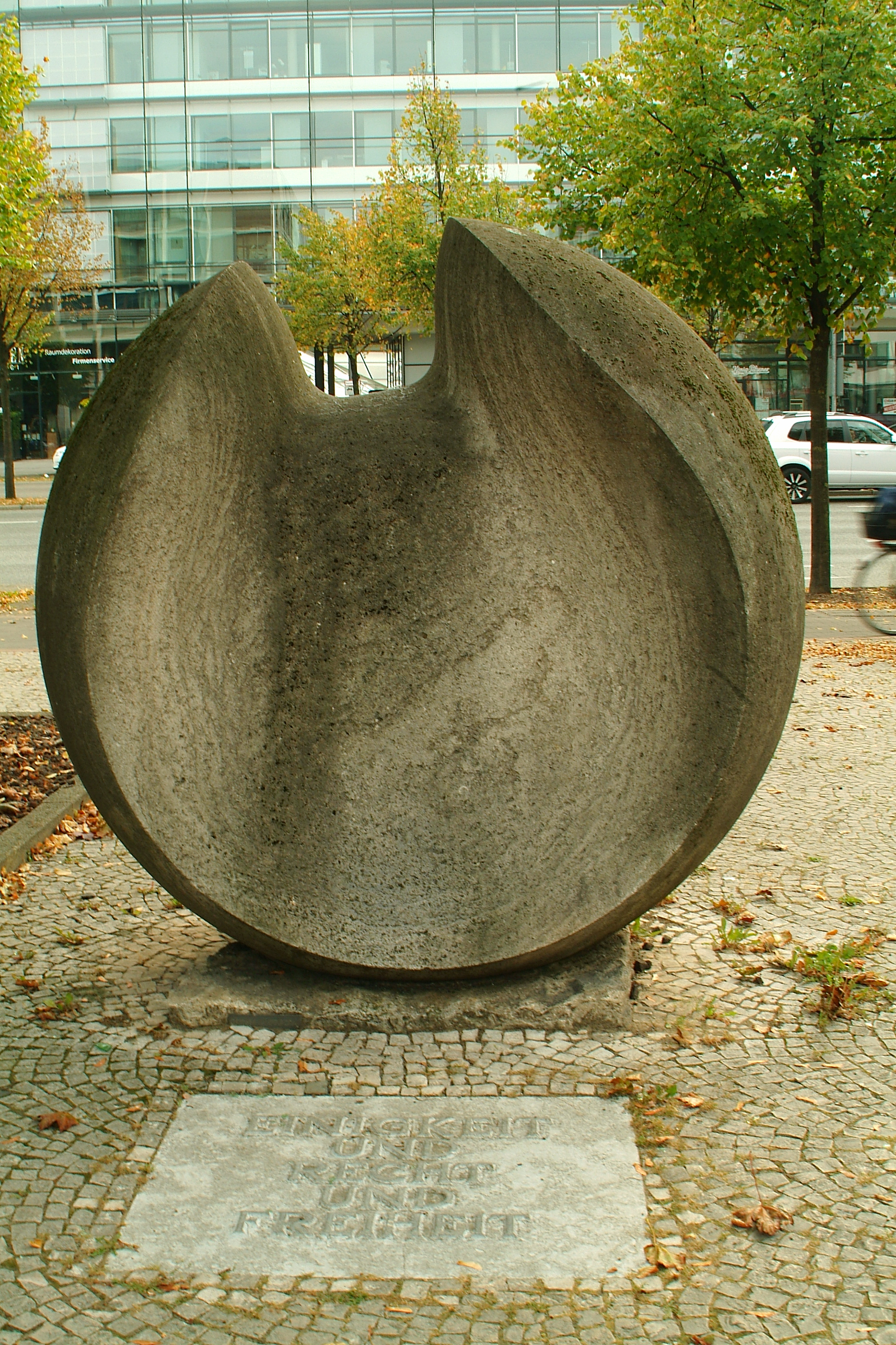 Die Große Kugelform von Karl Hartung, Blick über den Friedrichswall Richtung Norddeutsche Landesbank.